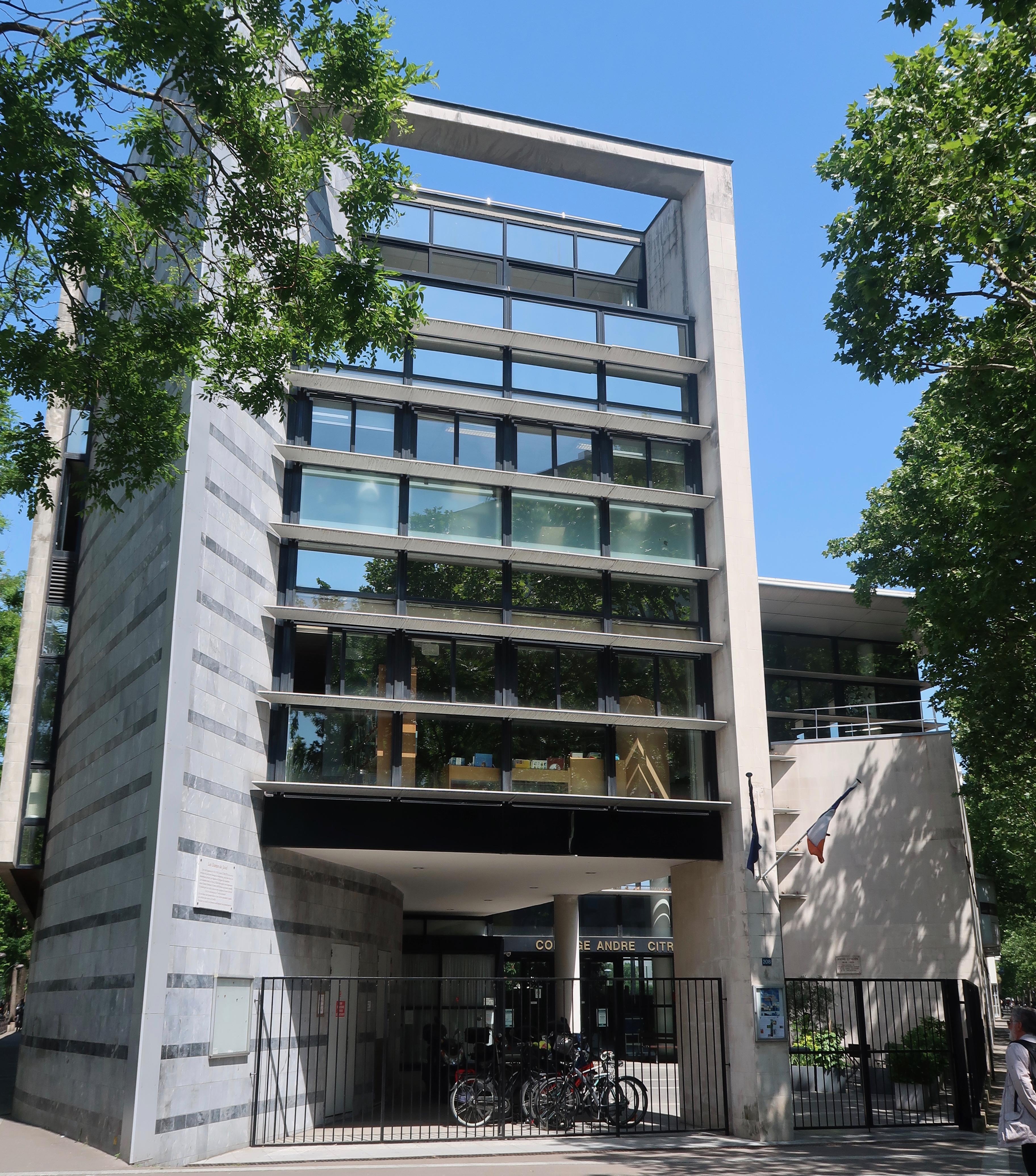 Collège André-Citroën, n° 208 rue Saint-Charles (Paris, 15e).